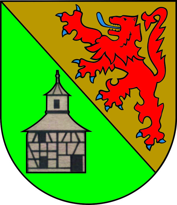 Wappen von Asbach (Hunsrück)